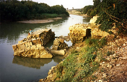 Turbinenmühle in Testour, Tunesien